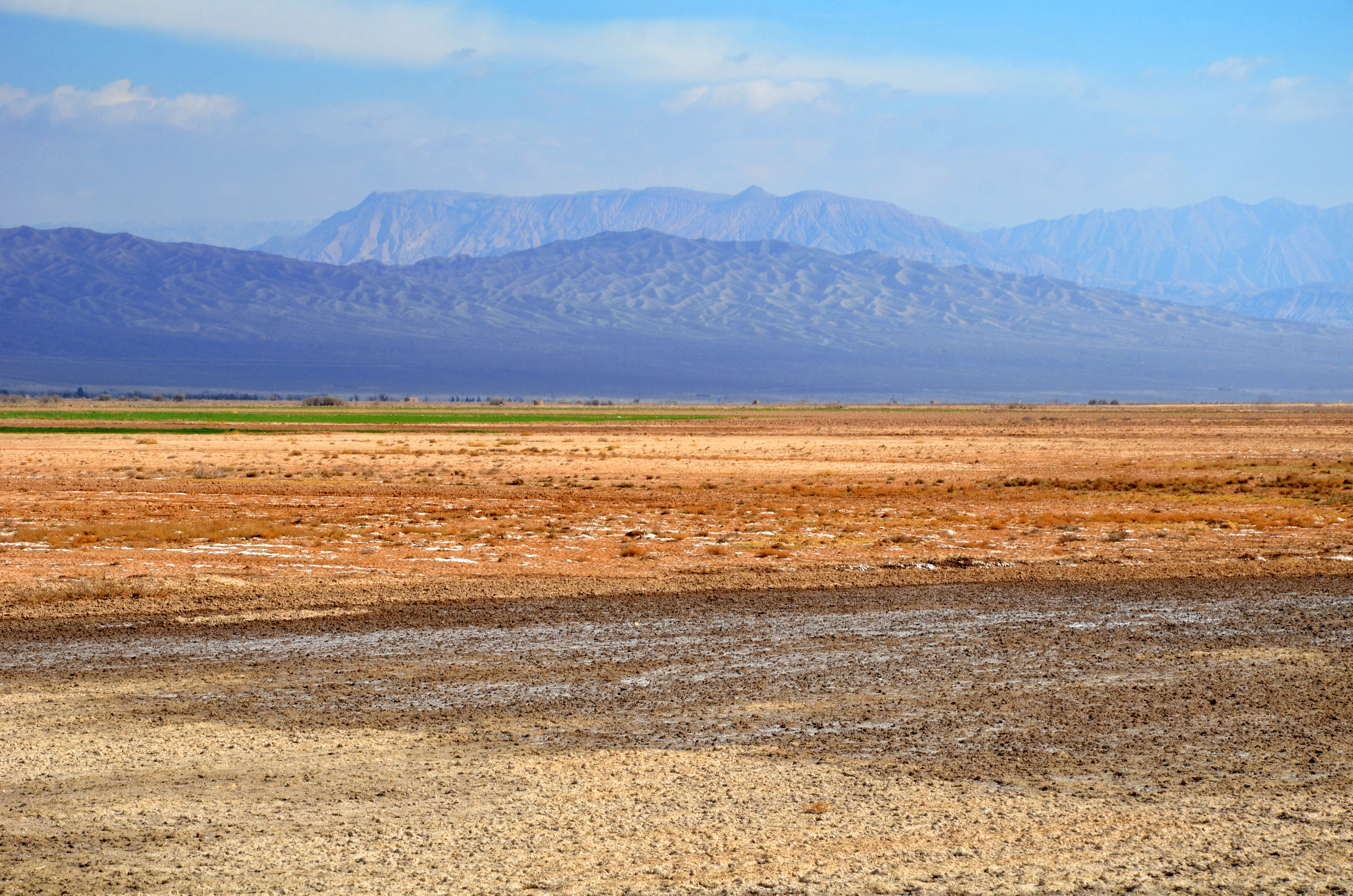 Garmsar - Lajran